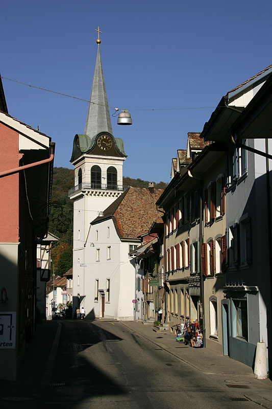 Waldenburg - im Städtchen